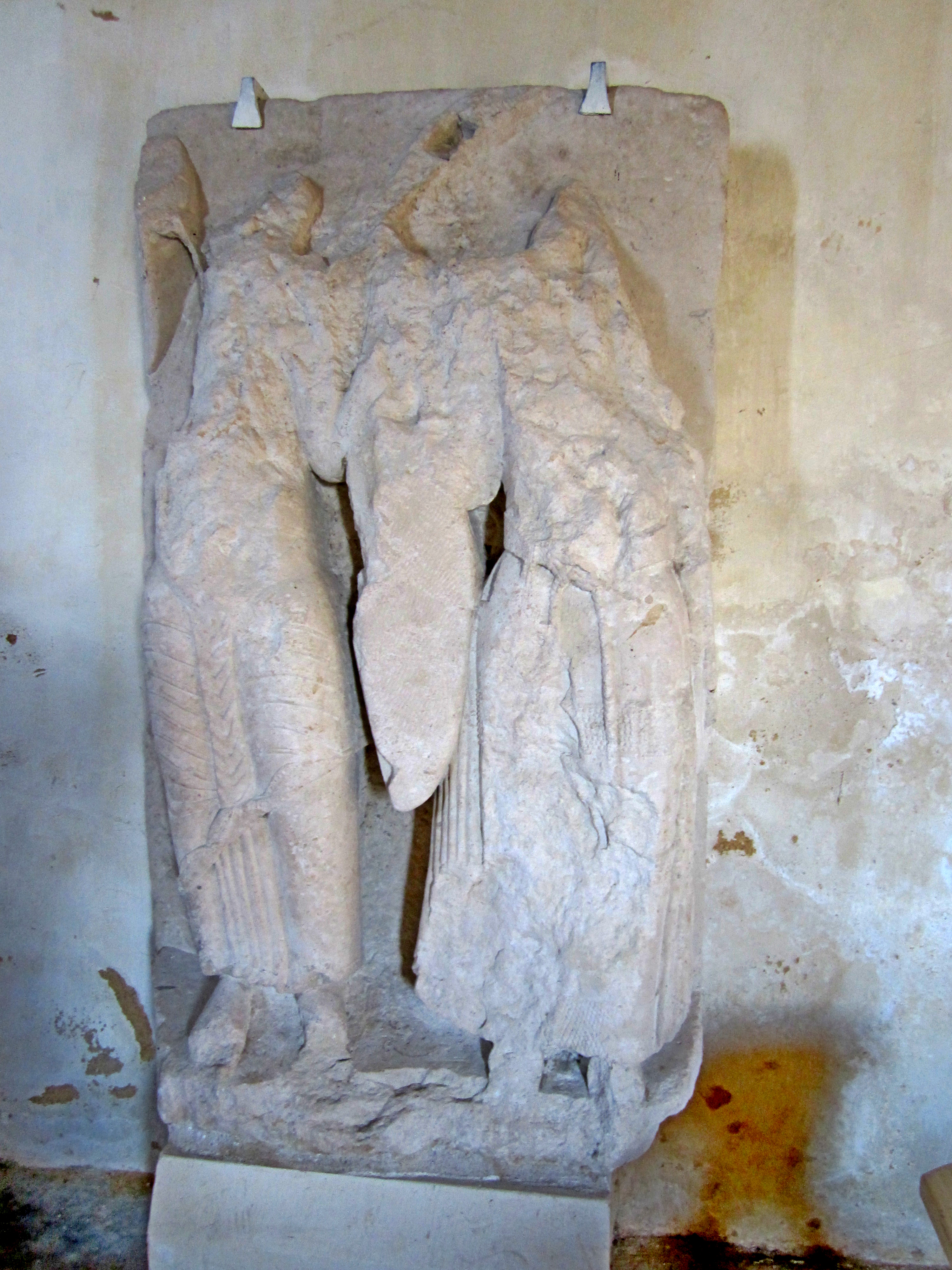 Église Saint-Roch de Chalais, Saint-Pierre-le-Vieux, Vendée